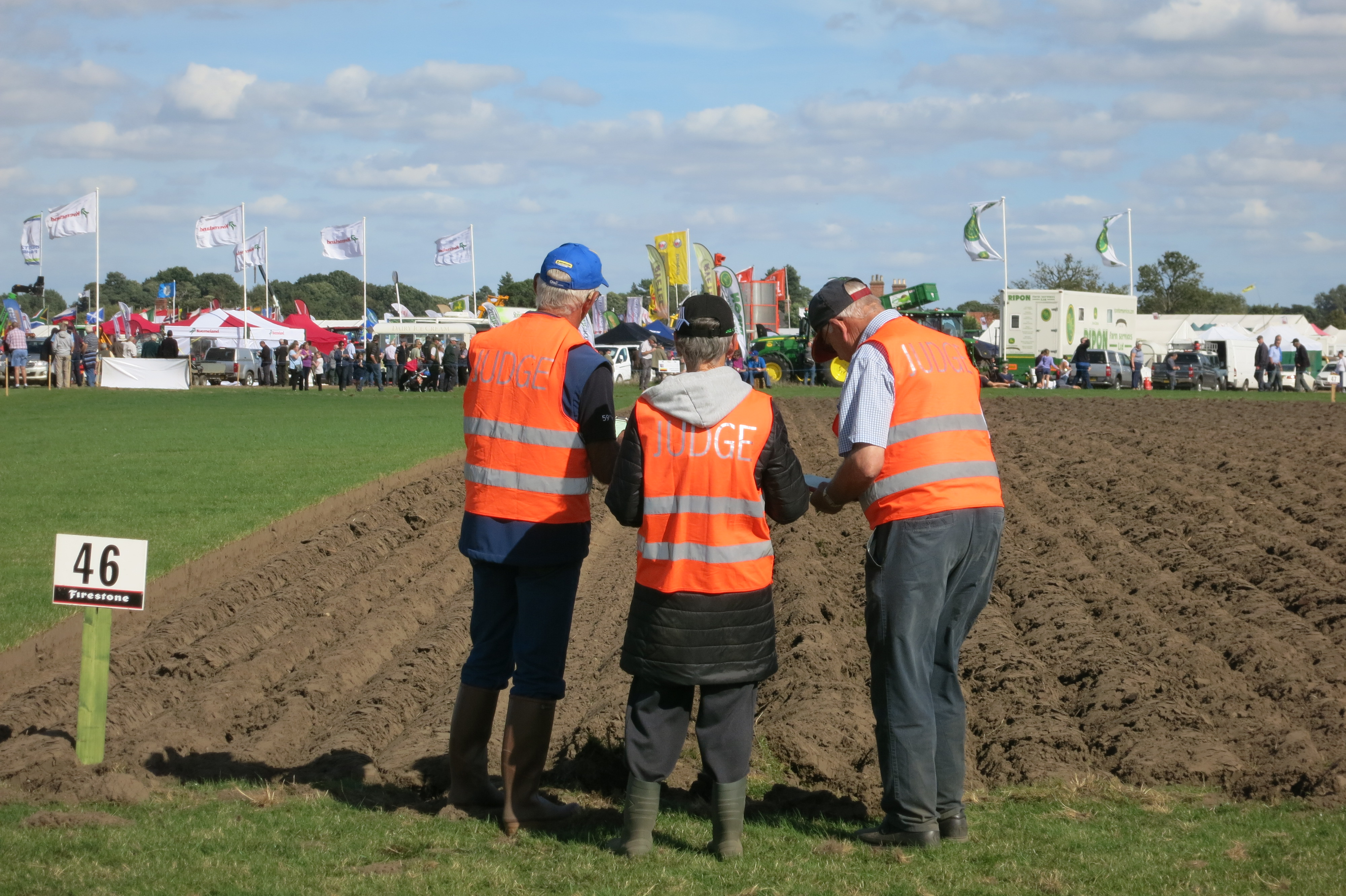 Bewertungskommitte